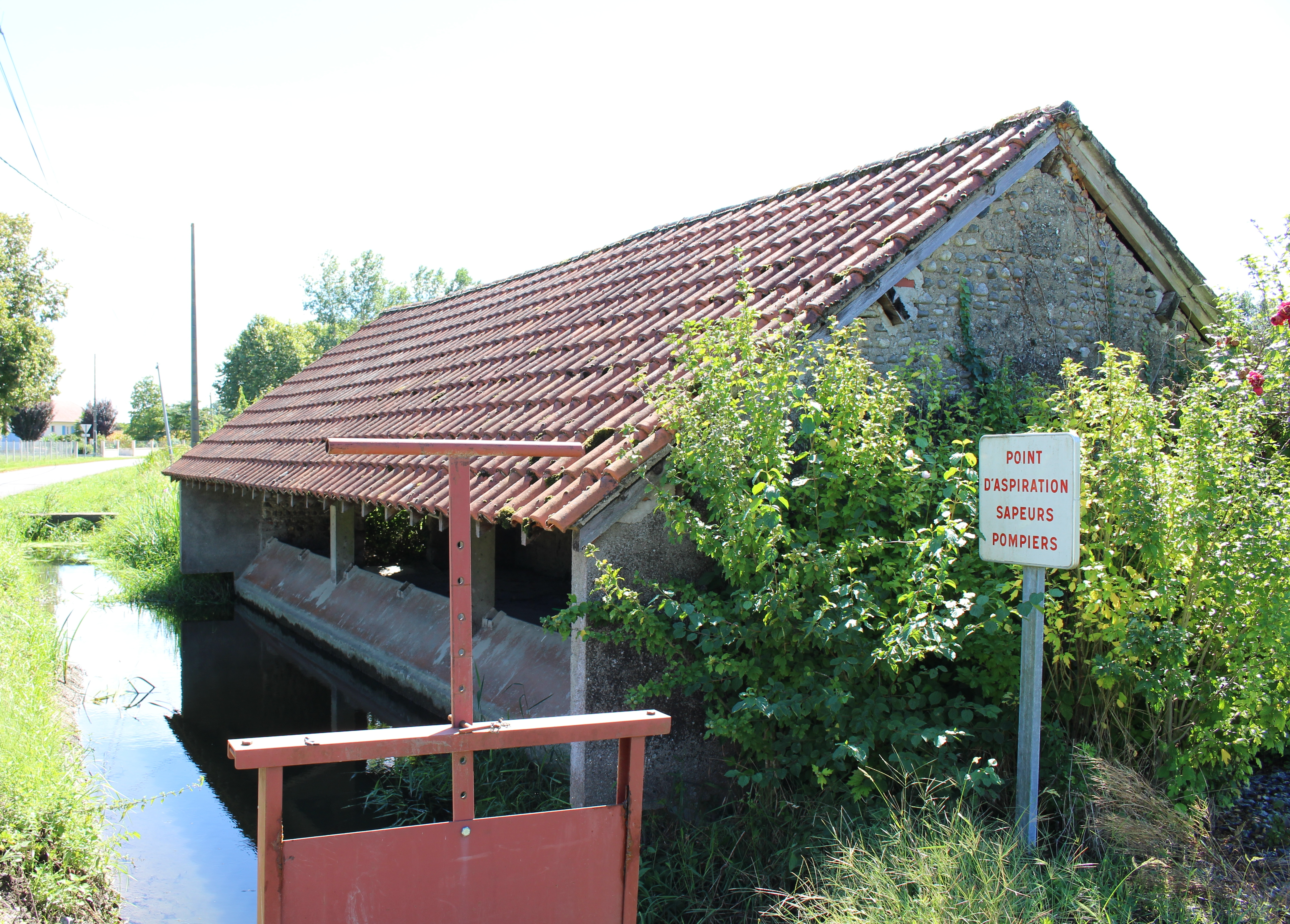 Lavoir de Lafitole (RD8) (Hautes-Pyrénées)